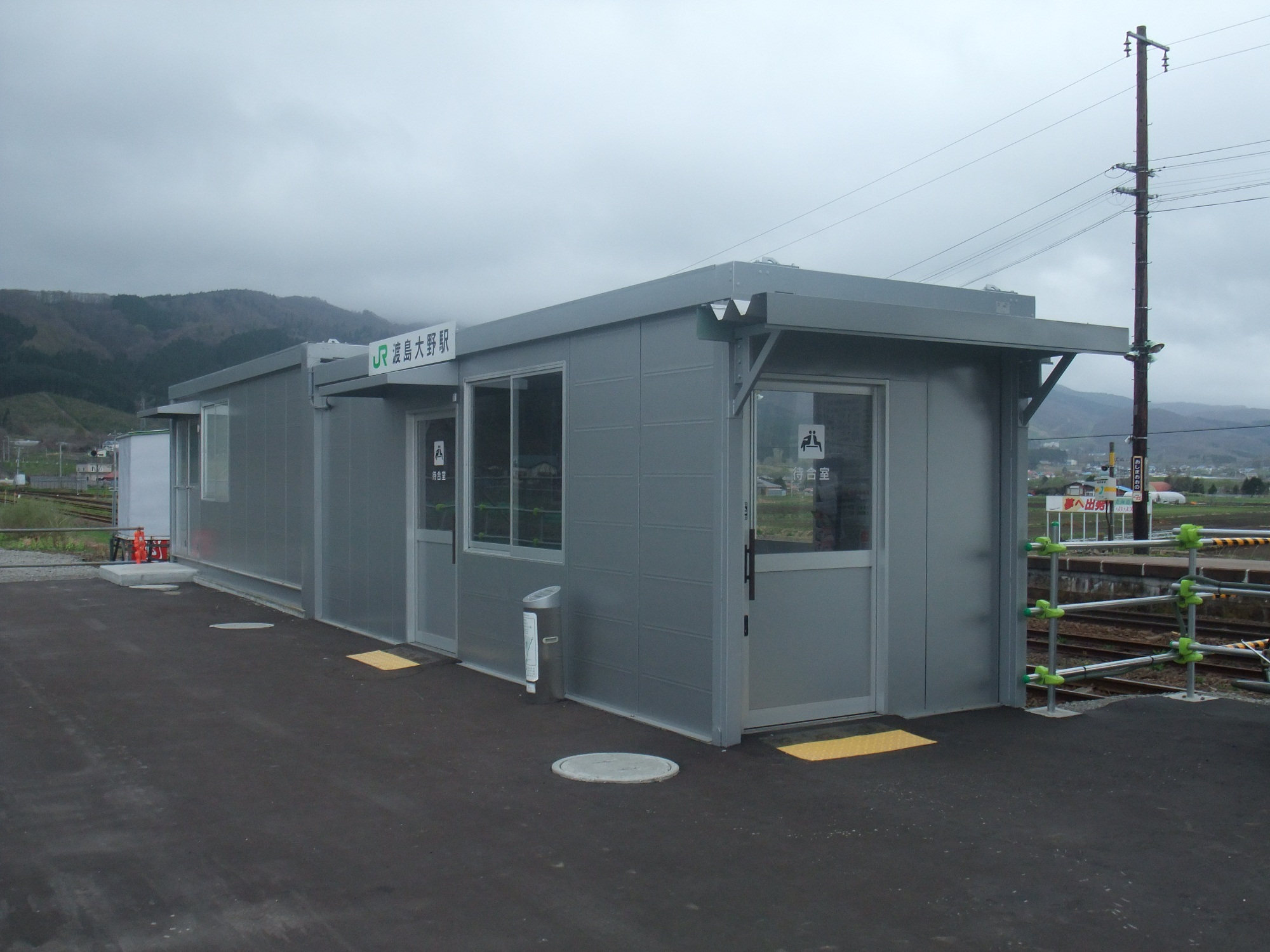 渡島大野駅(2012/05/03)